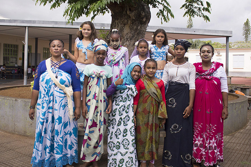 Des femmes et des filles mahoraises posent en groupe. Elles portent le salouva coloré traditionnel de Mayotte et pour certaines un kichalle assorti ; leurs bras sont couverts par un body en coton. Elles sont maquillées, mais seules la femme de droite et les jeunes filles ont des motifs sur le visage, tracés avec du msizano. Cette photo en tenues traditionnelles a été prise à l'école primaire du Centre, Saint-Joseph, le lundi 23 novembre 2015 pour Wiki Loves Africa. Description : classe de CM1. Photographie : Patrice Tillum (animateur périscolaire). This is an image of Cultural Fashion or Adornment from Réunion